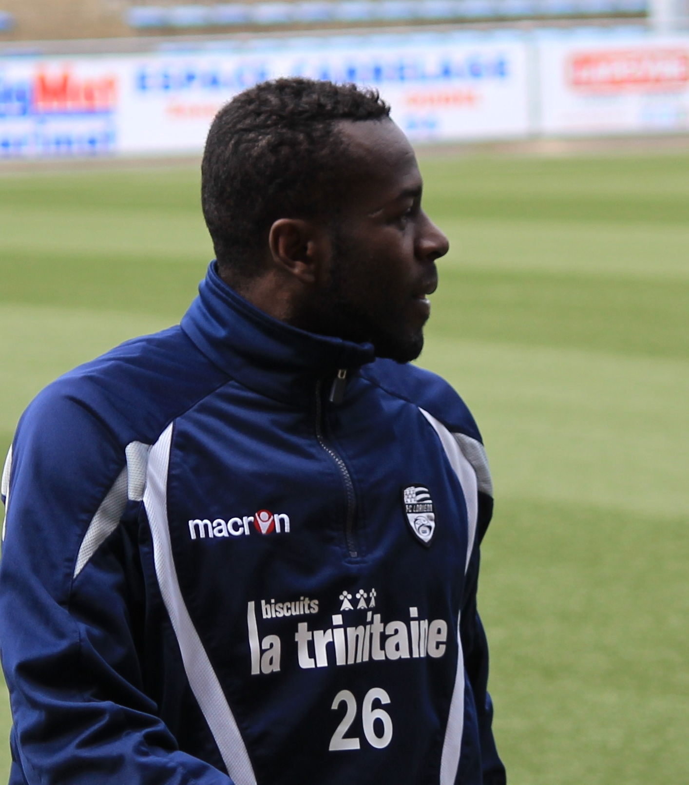 Tony Koutouan pendant un entrainement du FC Lorient le 24 mai 2013